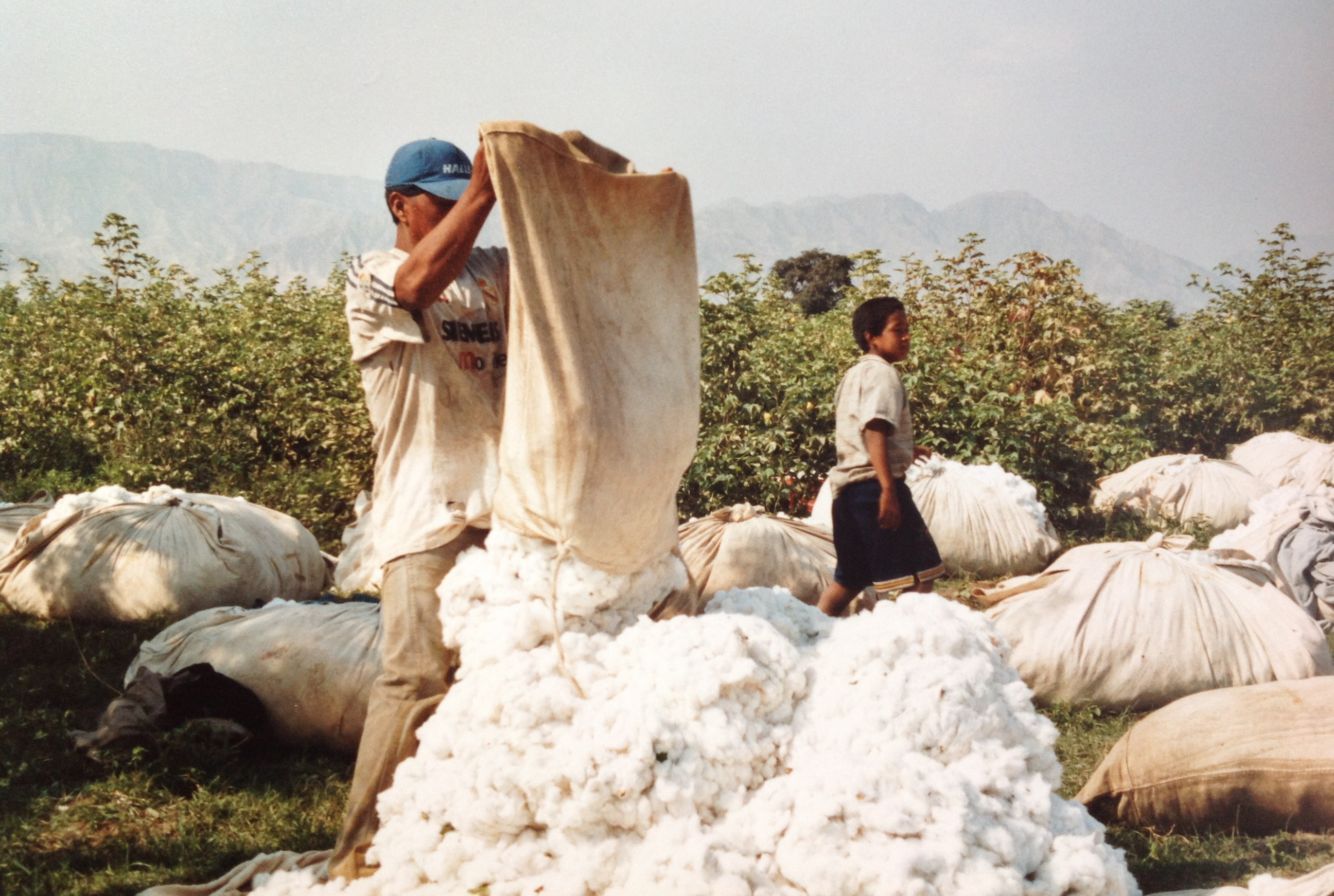 Récolte du coton à El Carmen - Chincha - Pérou - Prise de vue effectuée durant le tournage du Documentaire "Negra"